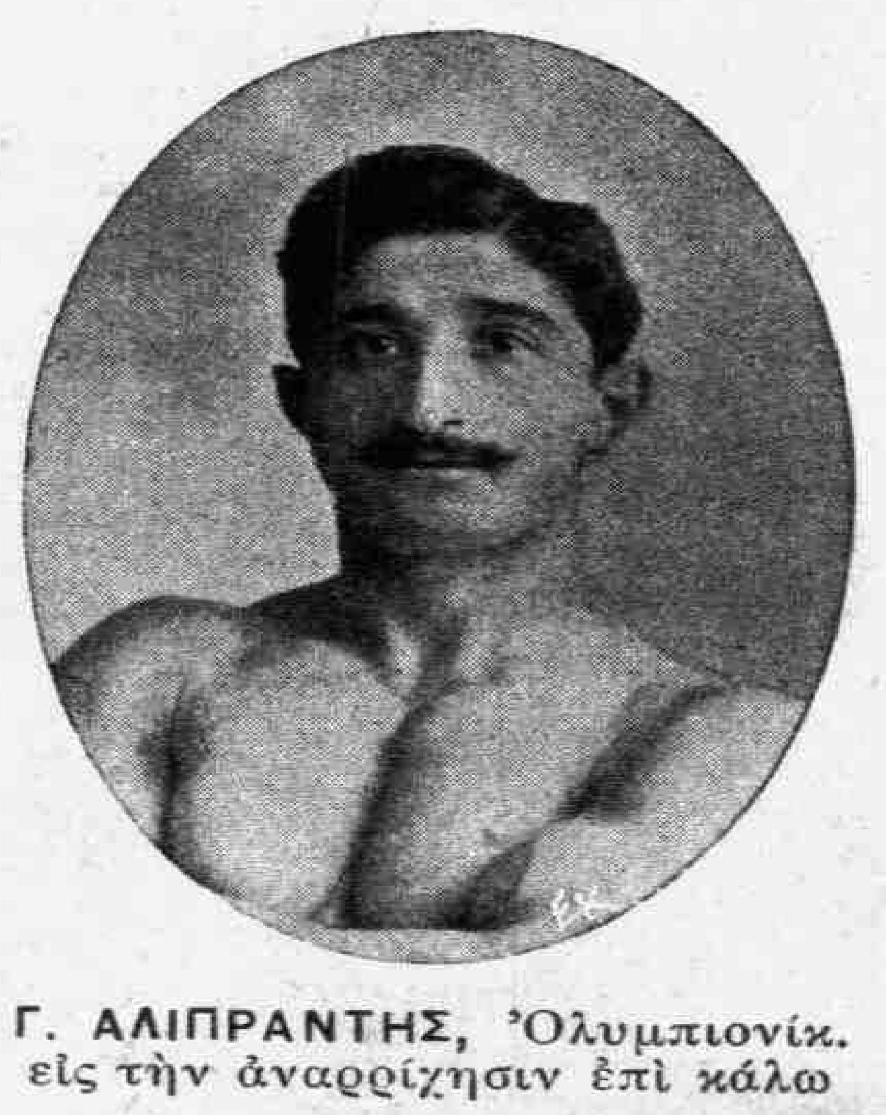 griechischer Sportler, Athen, 19. Jahrhundert